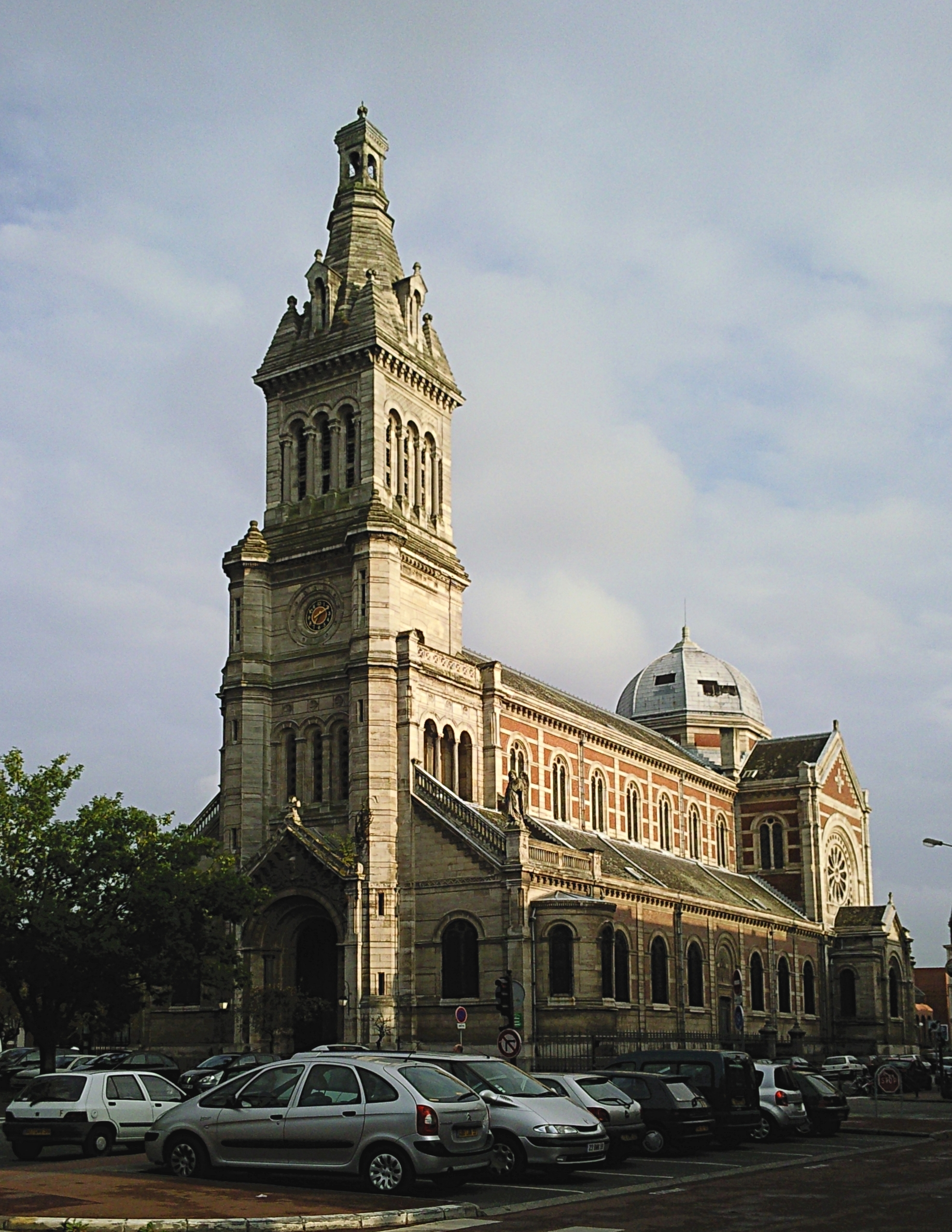 L'église Saint-Michel, à Lille, construite entre 1868 et 1874 par l’architecte Alfred Coisel.